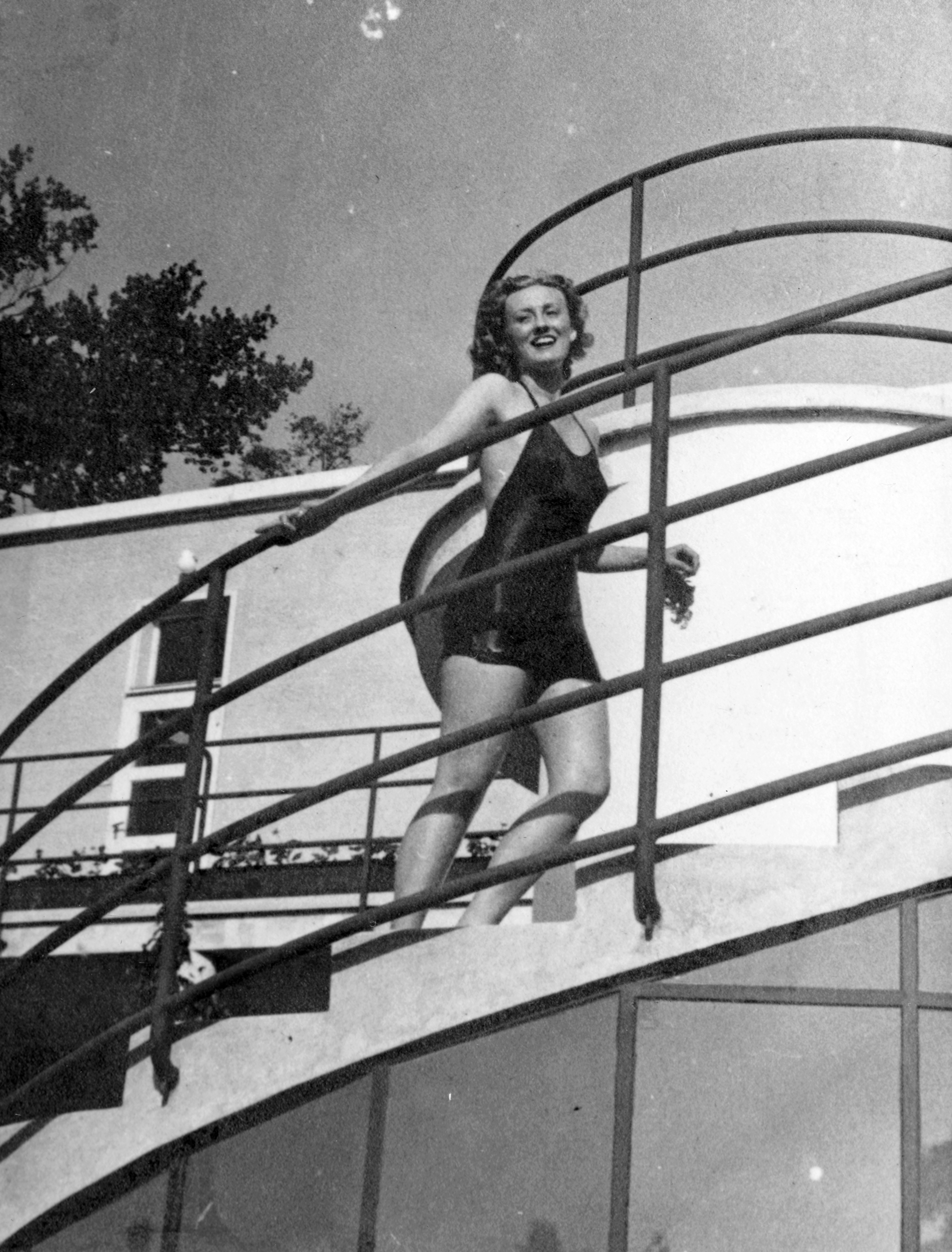 Palatinus Strandfürdő, Simor Erzsi színművésznő. Location: Hungary, Budapest, Margit Islands Title: Palatinus Strandfürdő, Simor Erzsi színművésznő.